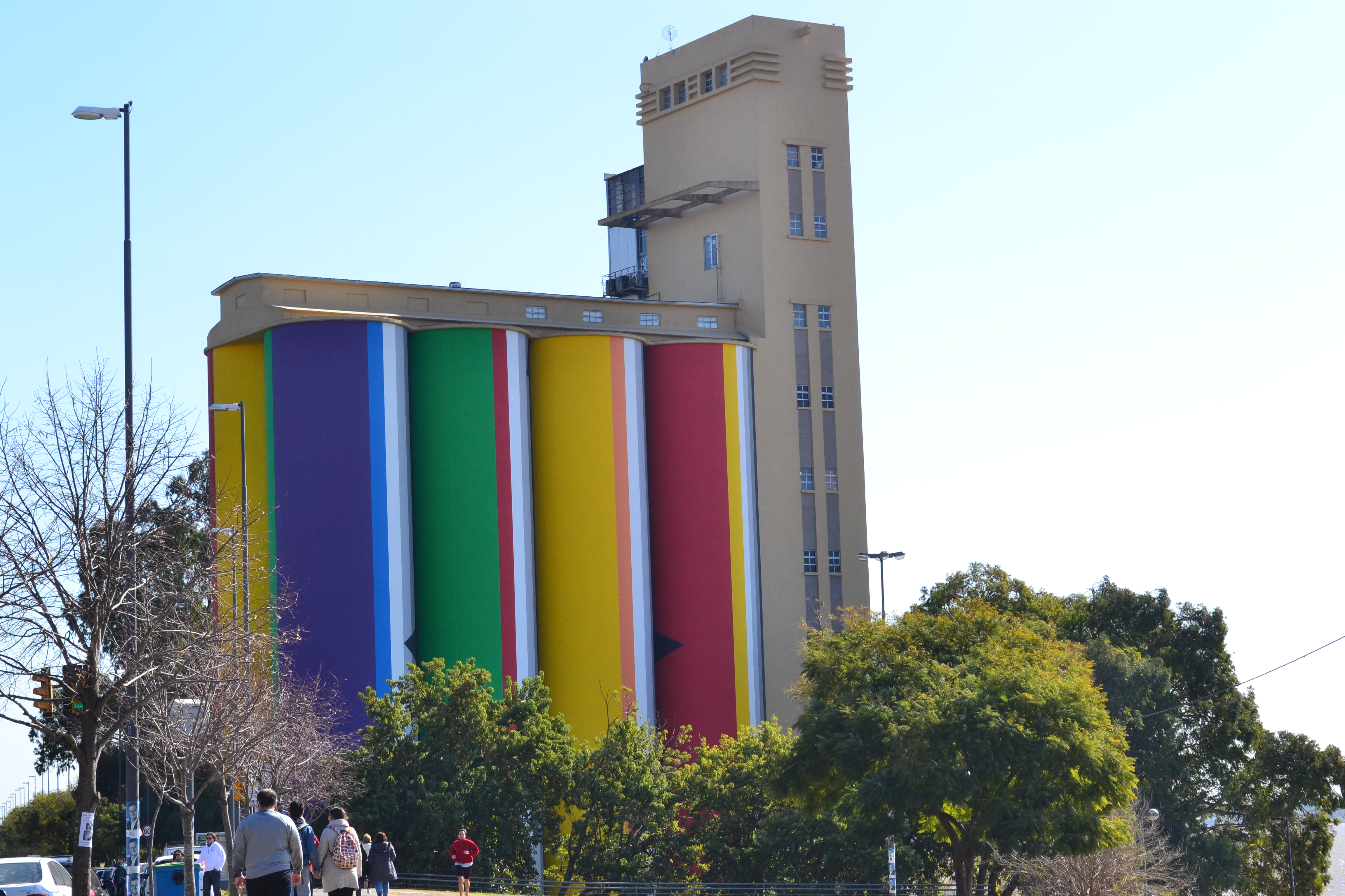 Ubicación: LOPEZ ESTANISLAO 2250 - Rosario (Santa Fè)